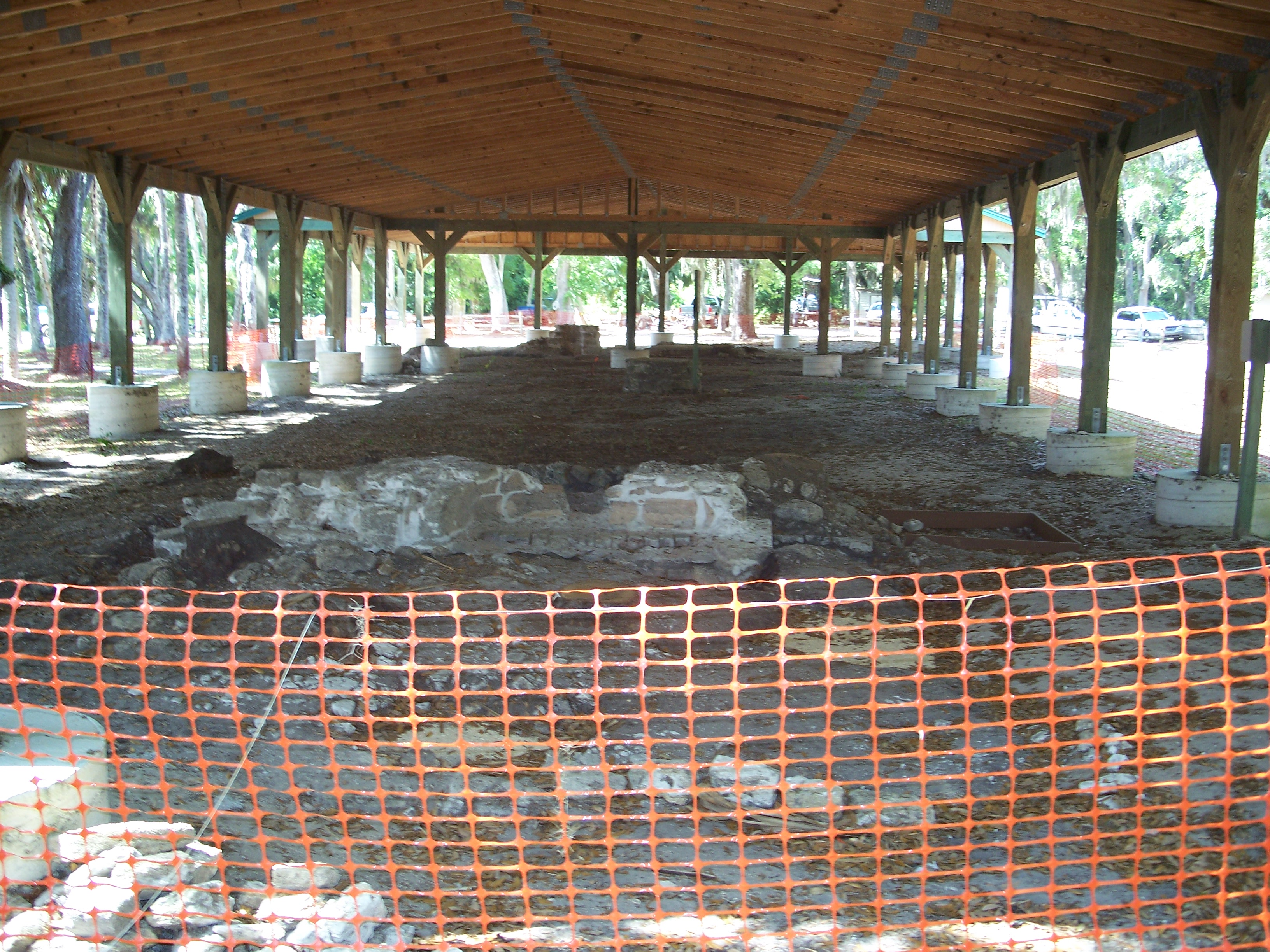 Palm Coast, Florida: Mala Compra Plantation Archeological Site